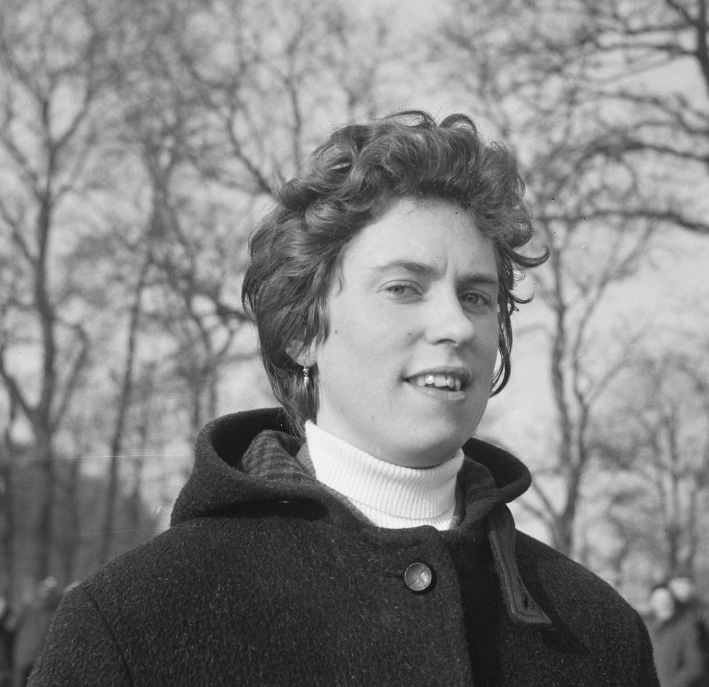 Grietje Oosterhof